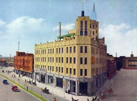 Paoshan Dept. store of Hsinking（宝山百货店，新京）